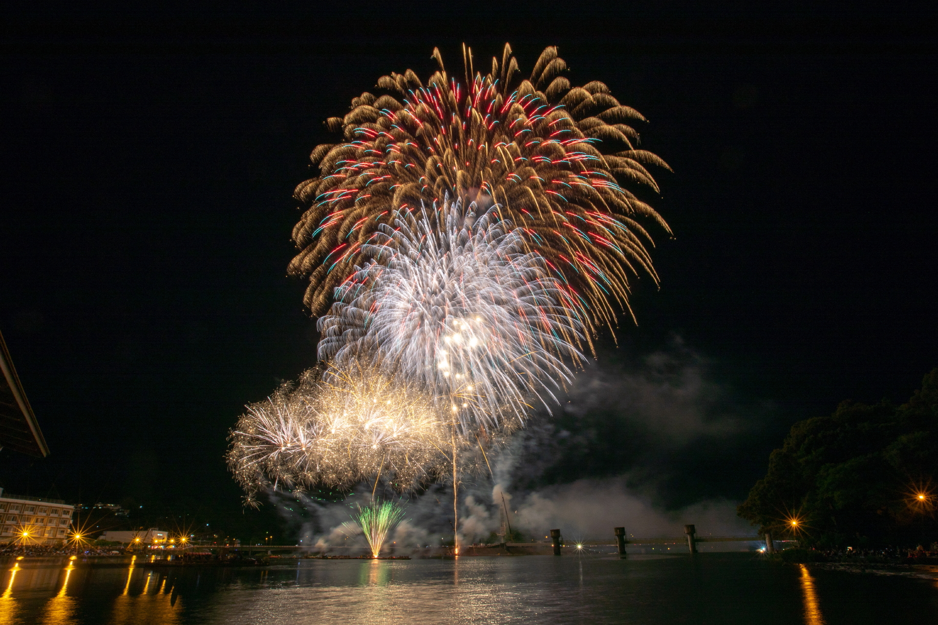 日田川開き観光祭2018での三隈川に打ちあがる花火